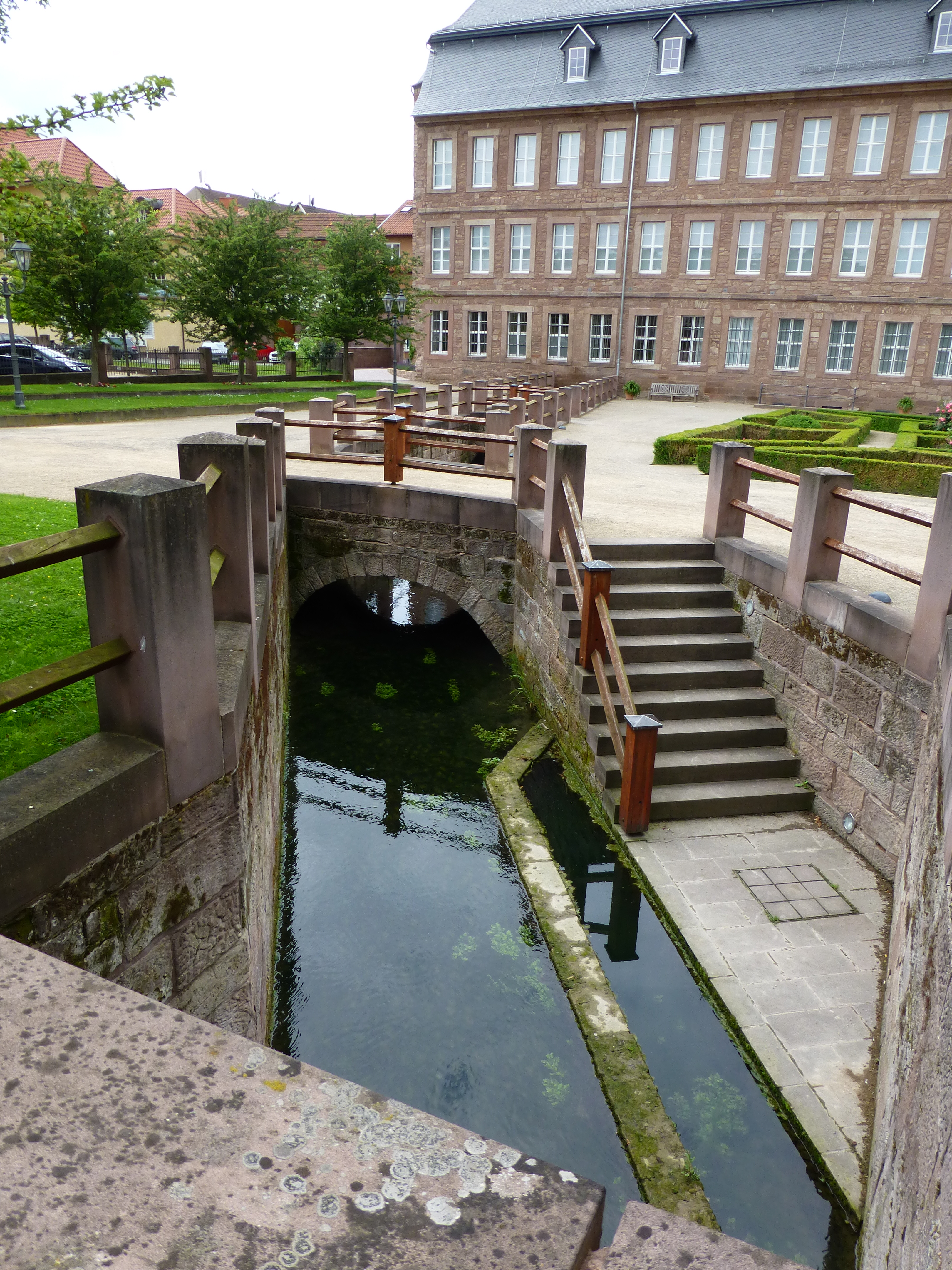 Jesuitenkolleg in Heiligenstadt vom Barockgarten aus gesehen